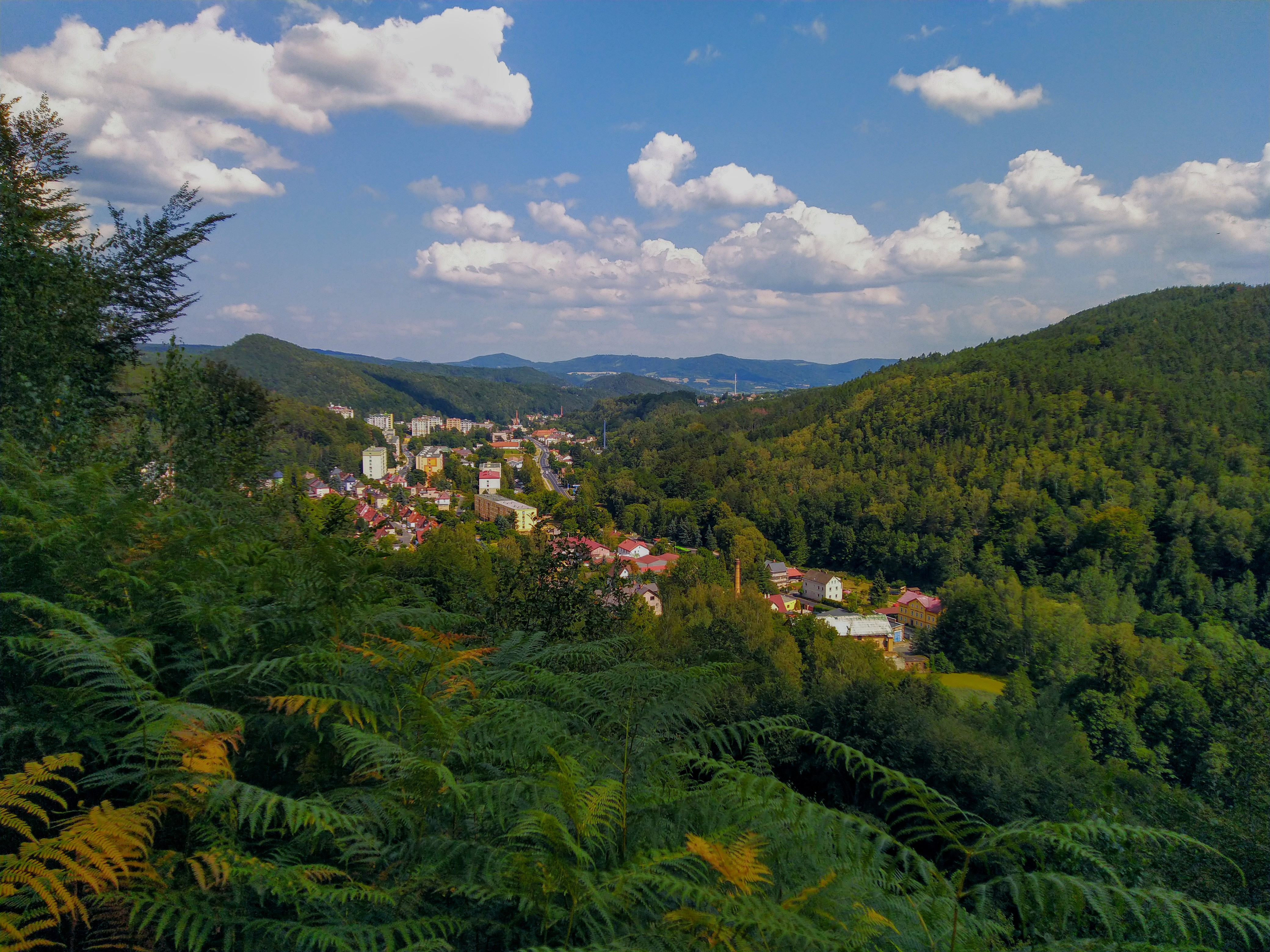 Pohled na Děčín-Bynov ze západního směru.